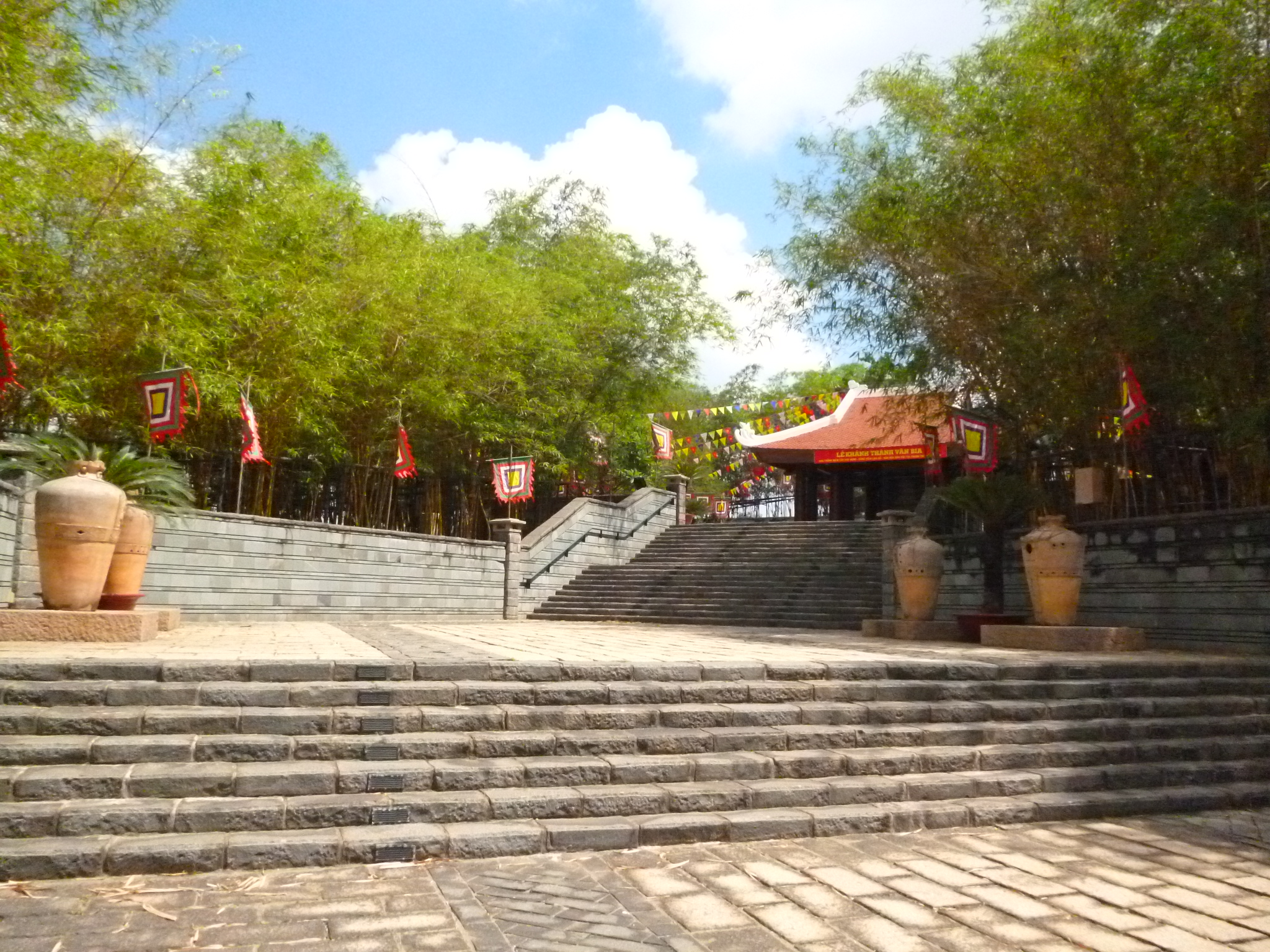 Hình chụp bằng máy ảnh cá nhân về công viên văn hóa lịch sử dân tộc quận 9